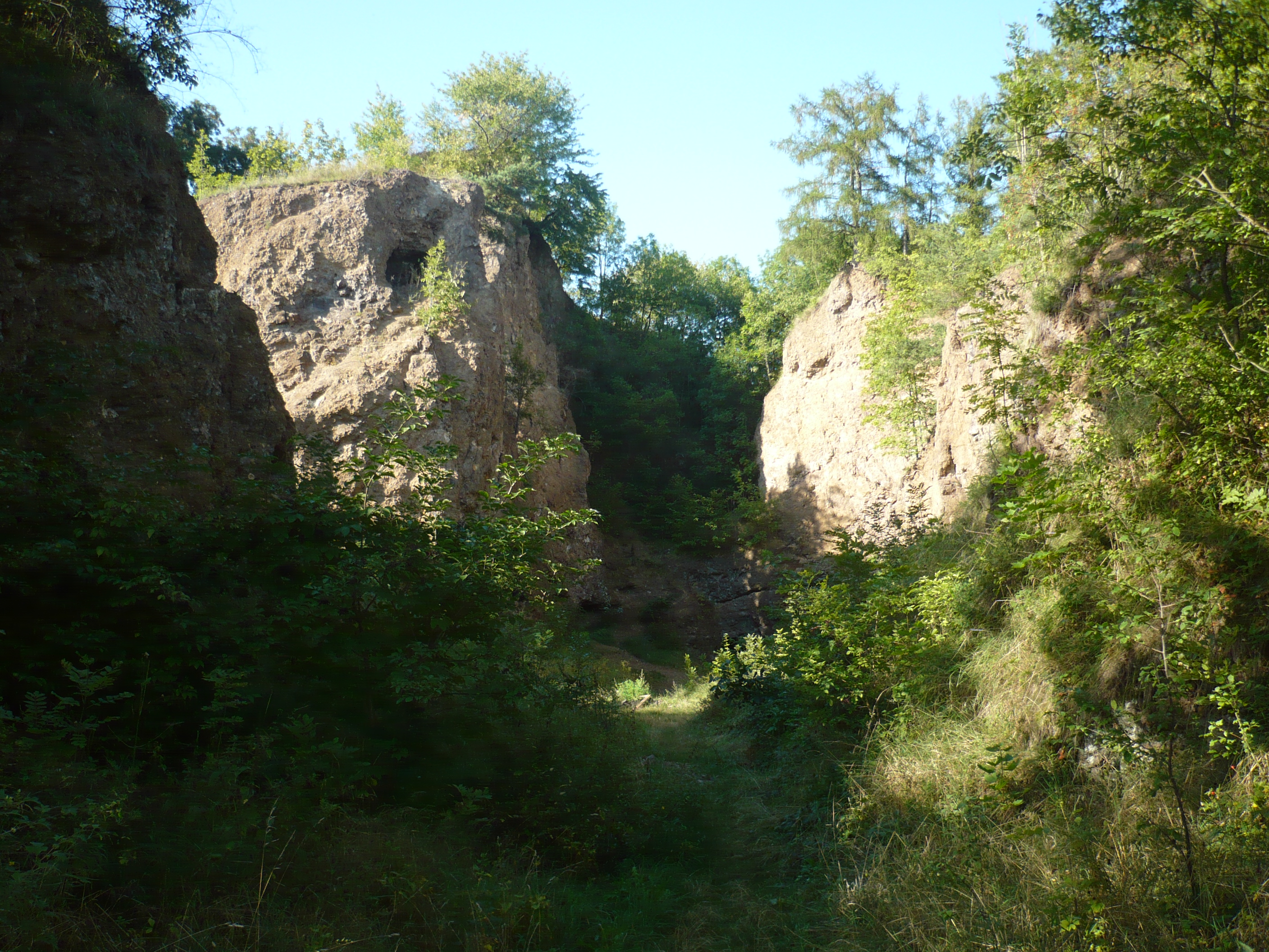 Hřídelecká Hůra, vstup do bývalého lomu.